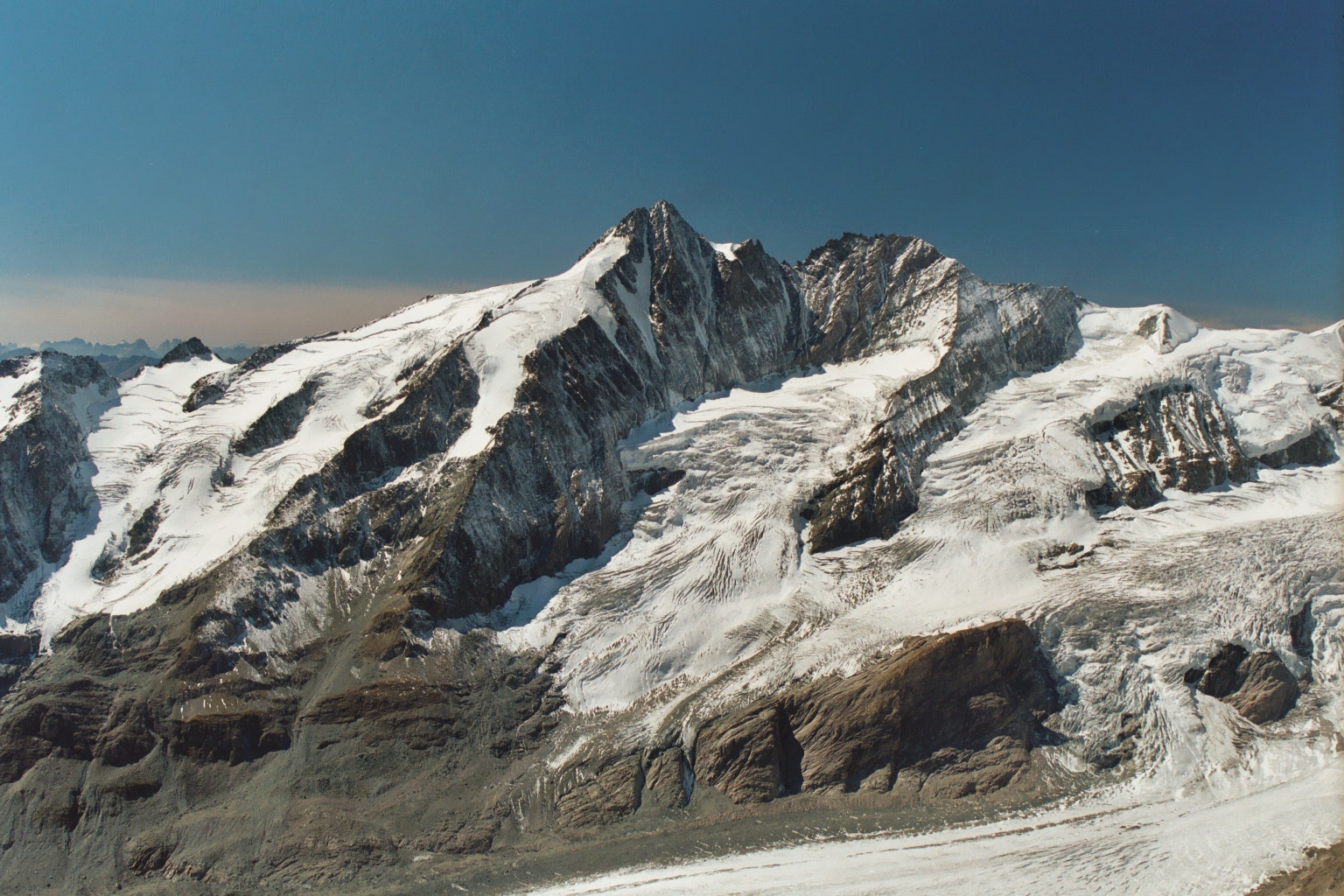 Großglockner vom Fuscherkarkopf aus gesehen